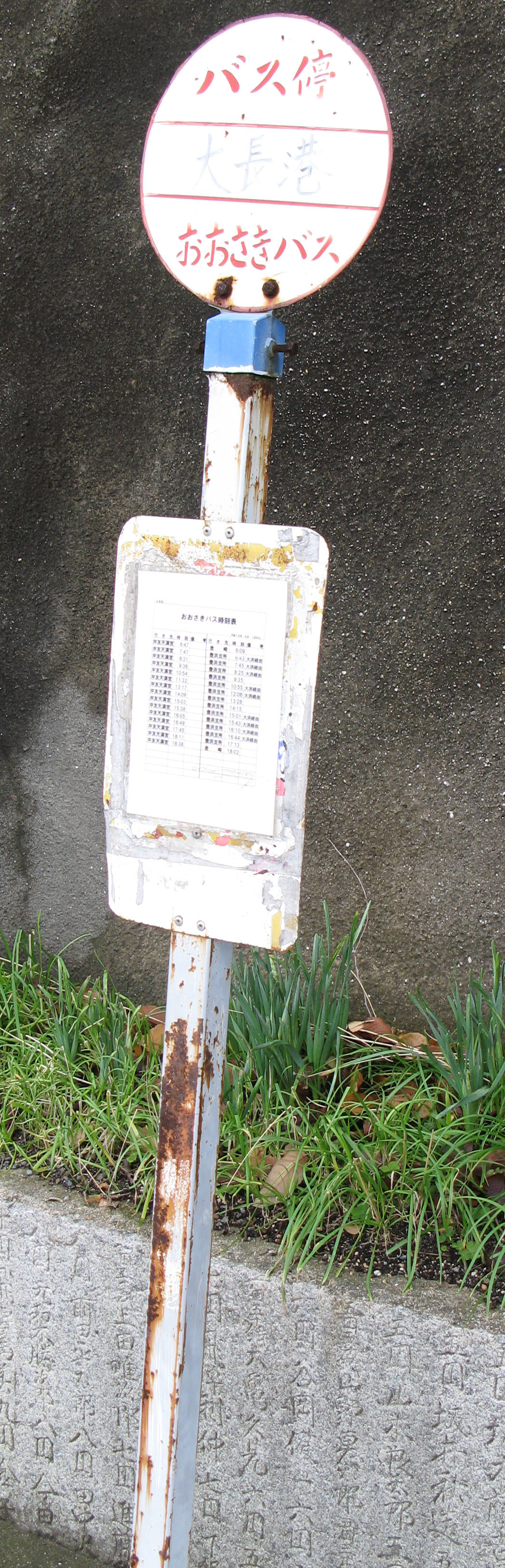 さんようバス（広島県） おおさきバス（旧社名）表記のバス停 大長港停留所